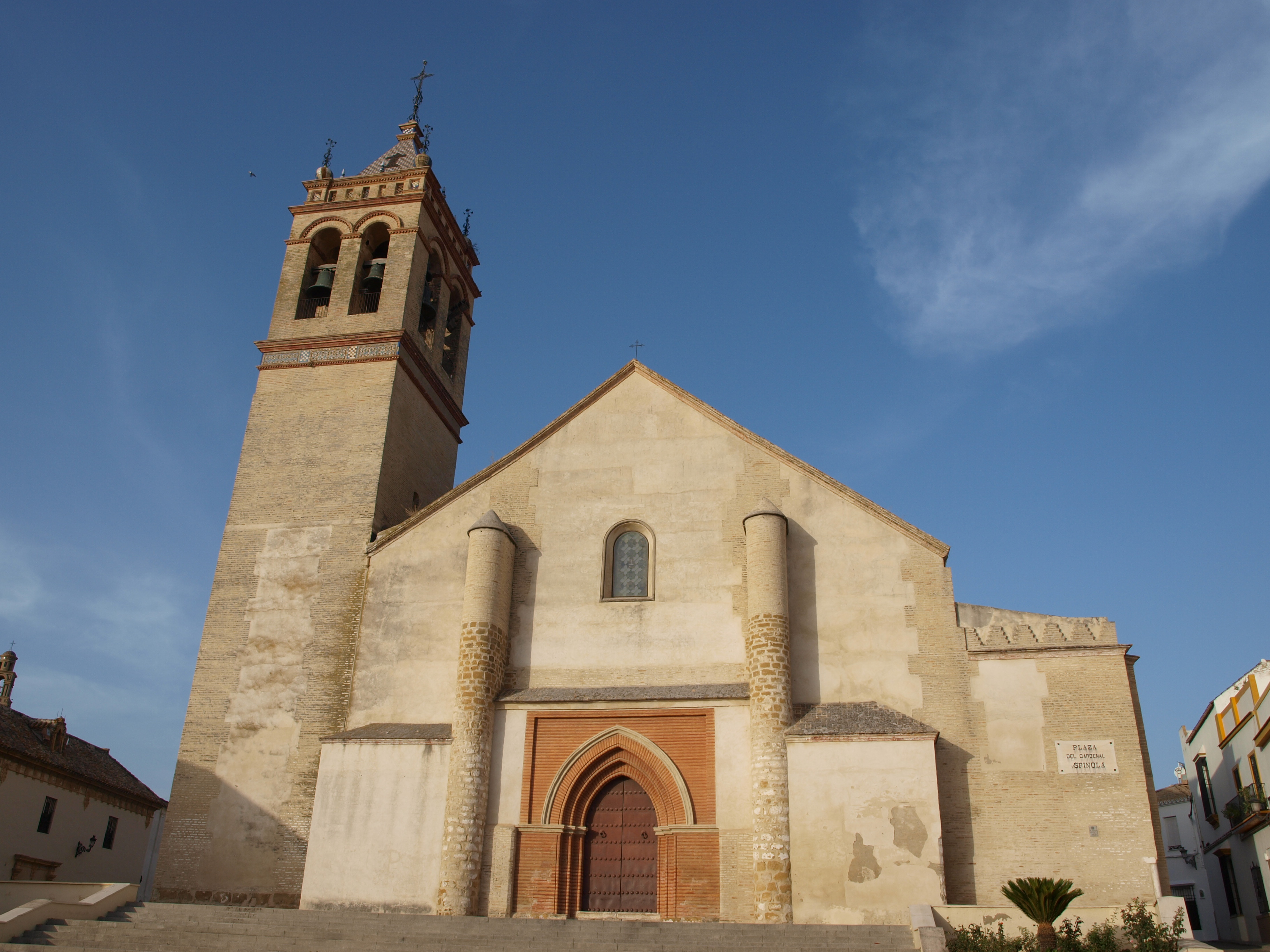 Església de Marchena